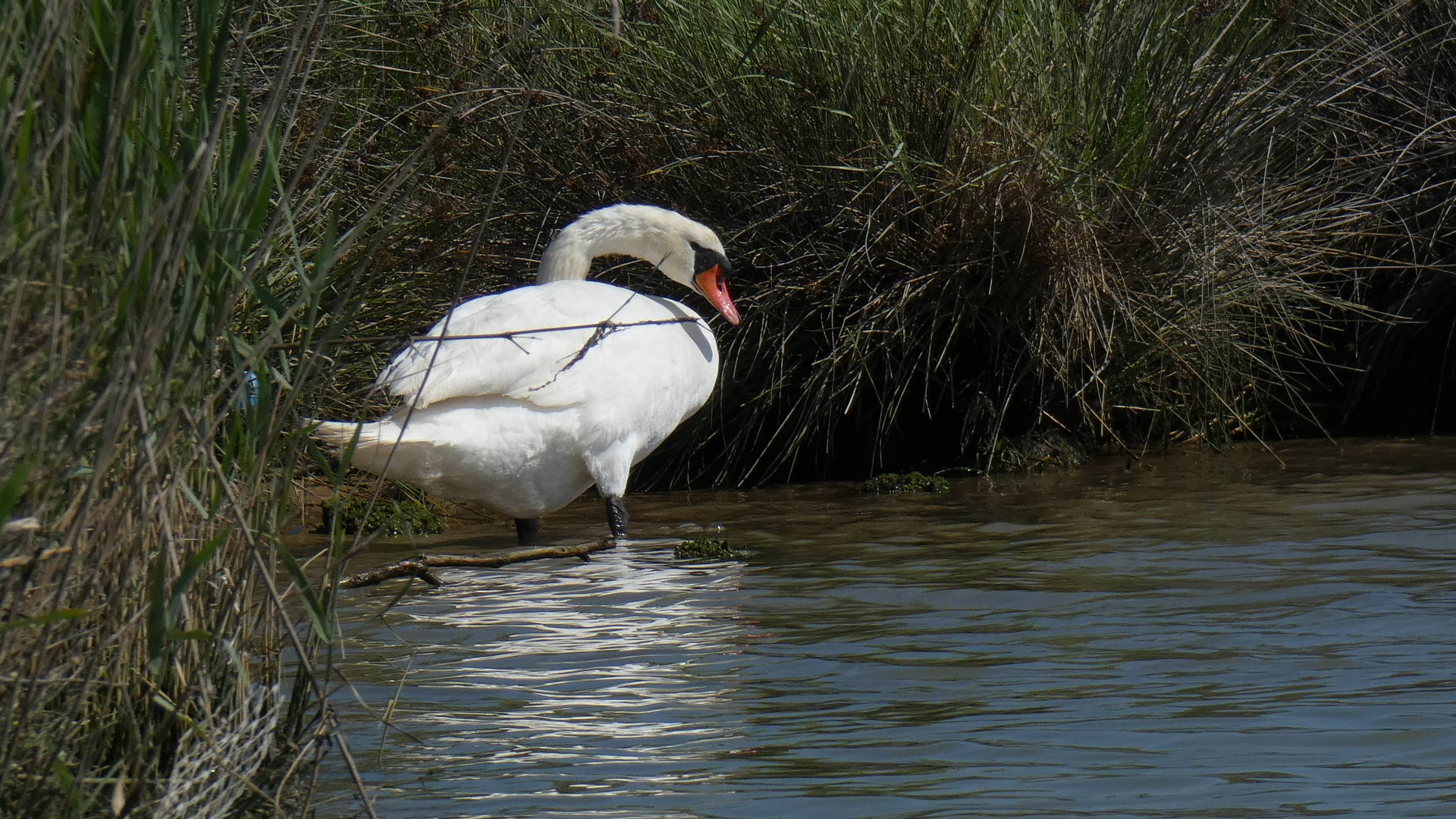 Laguna di Caorle - Foce del Tagliamento (Q55719904)